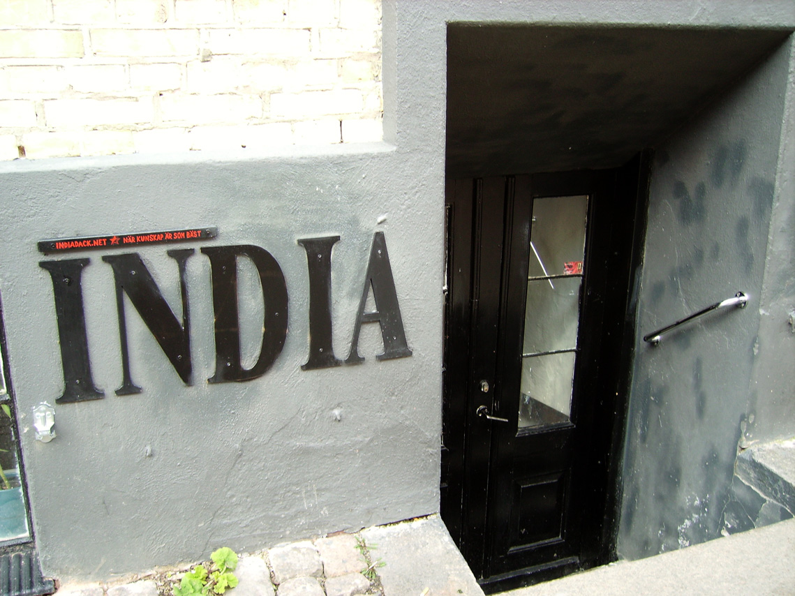 India Däck, Lund, Sweden